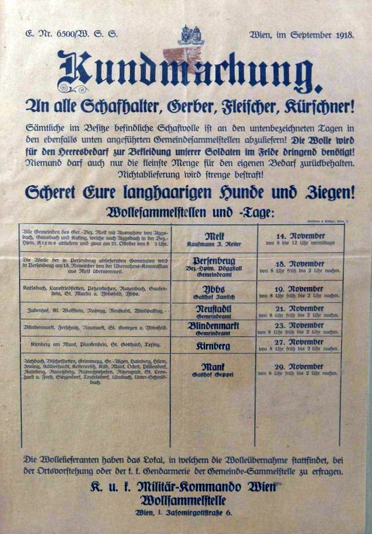 Kundmachung. An Alle Schafhalter, Gerber, Fleischer, Kürschner. Wien September 1918. Scheret Eure langhaarigen Hunde und Ziegen!